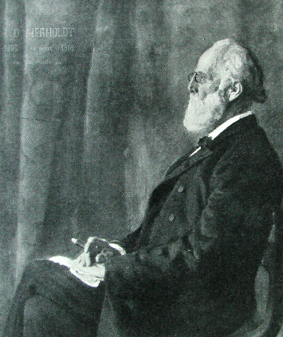 Johan Daniel Herholdt (født 13. august 1818 i København, død 11. april 1902) var en dansk arkitekt.